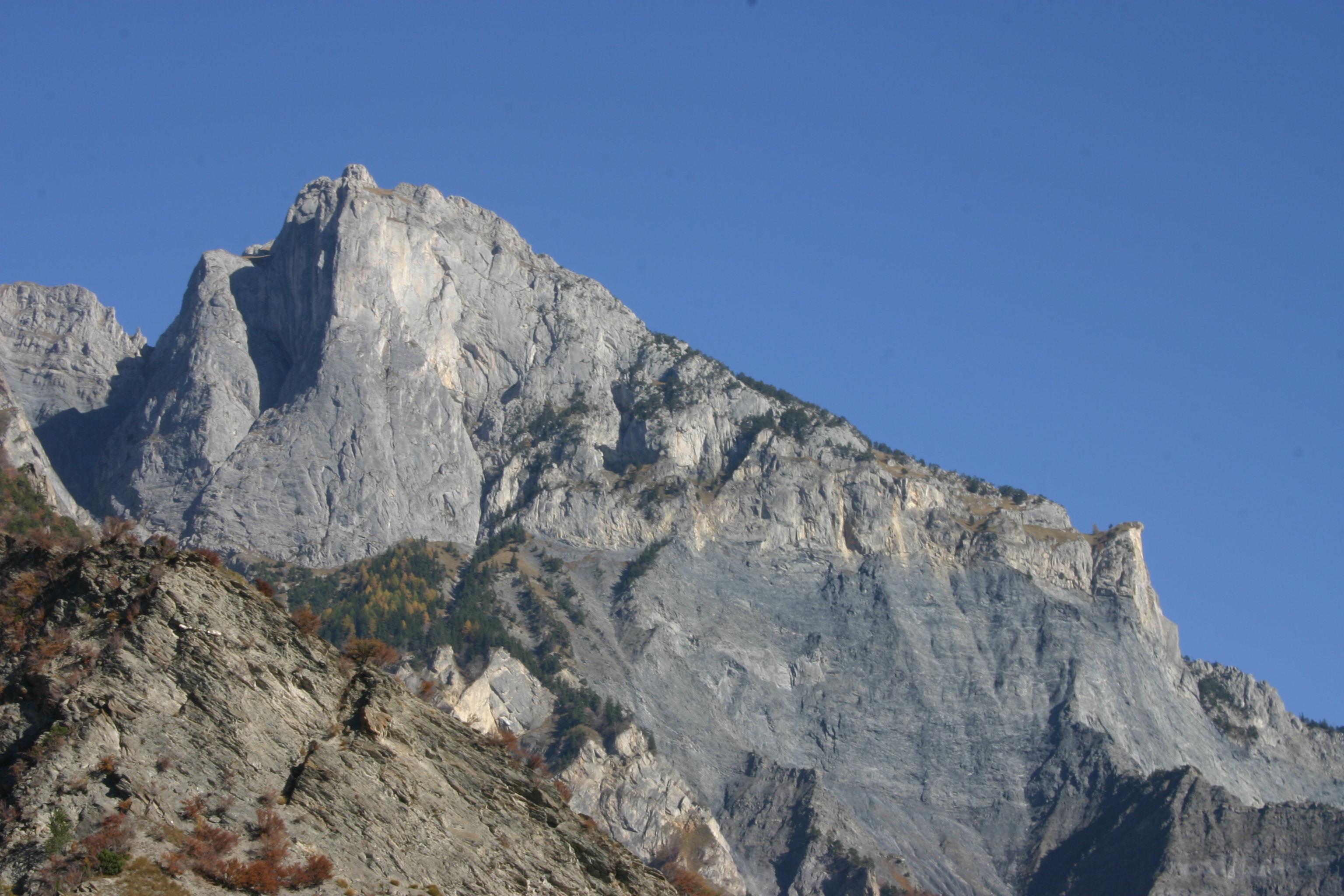 Montagne : La croix des têtes Licensing Auteur : Modesto Alexandre